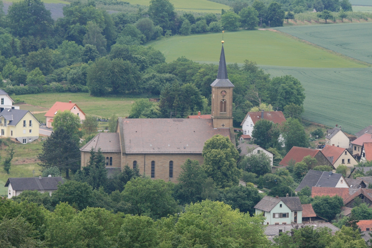 Röm.-kath. Kirche in Tiefenbach